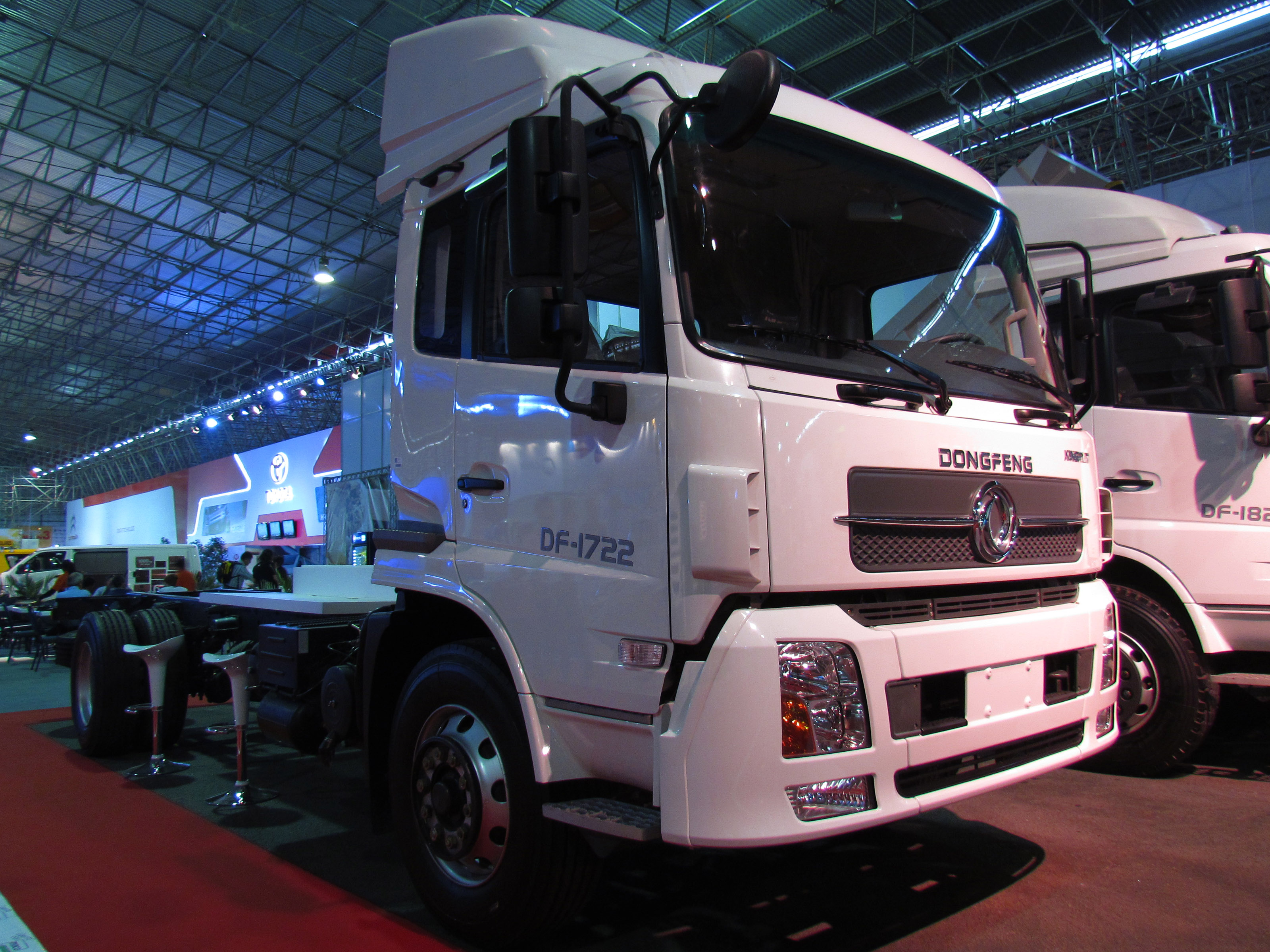 Dongfeng Kingrun DF 1722 2014